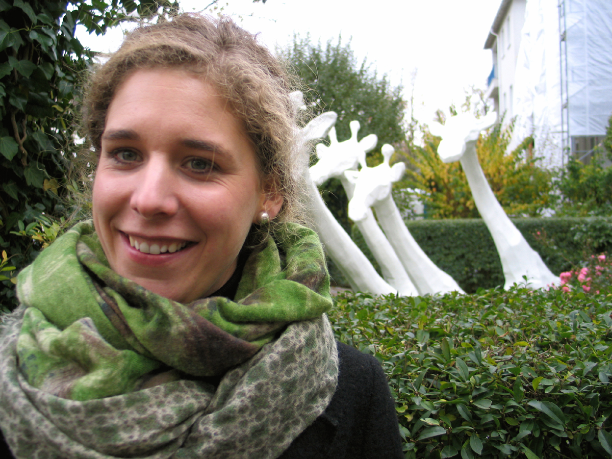 Die Bildhauerin Sina Heffner freut sich ob des großen Interesses der Besucher bei der Eröffnung der Ausstellung Wintergärten V - H2O, hier vor ihrem Werk "Wasserläufer" in der Güntherstraße, Hannover Waldhausen ...